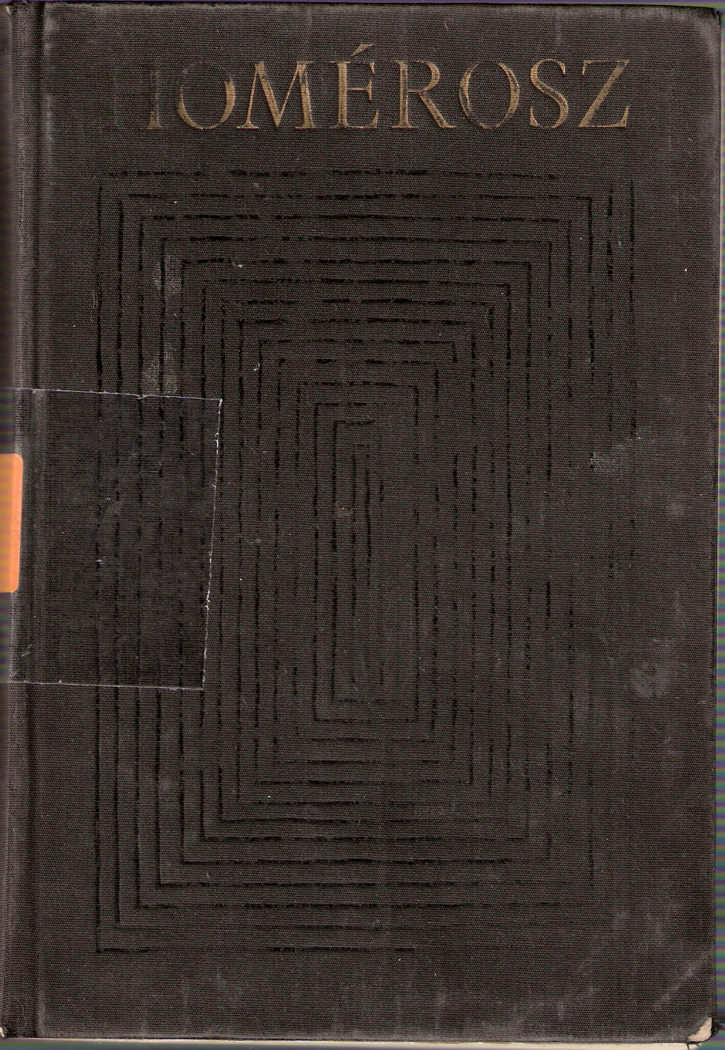 A Bibliotheca Classica sorozat tagjain megfigyelhető jellegzetes labirintusvonal